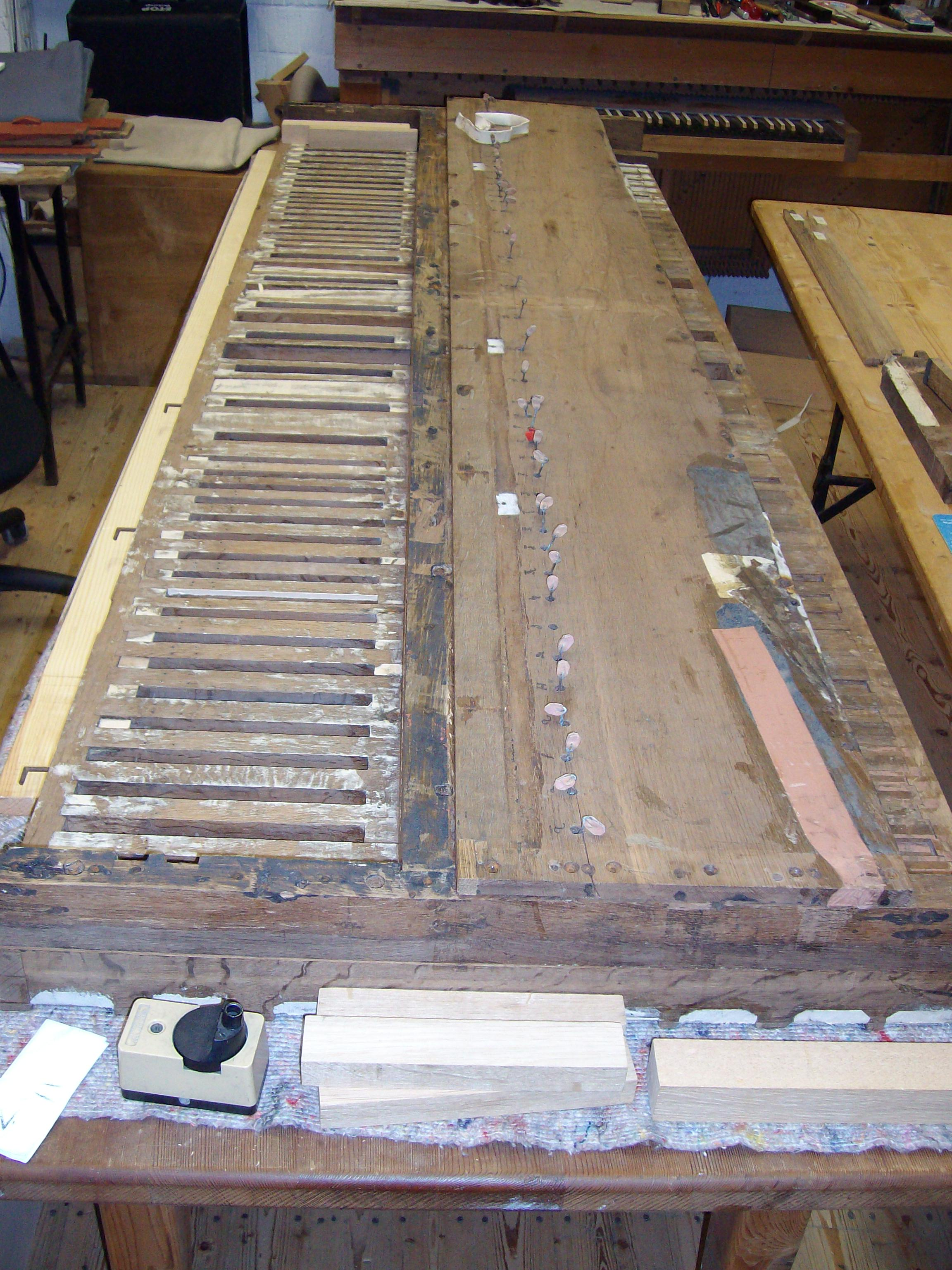 Windlade der Buttforder Orgel während der Restaurierung bei Ahrend